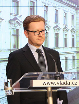 Zleva nejvyšší státní zástupce Pavel Zeman, ministr bez portfeje Petr Mlsna, premiér Petr Nečas (ODS), ministr spravedlnosti Pavel Blažek (ODS) a ministr vnitra Jan Kubice.